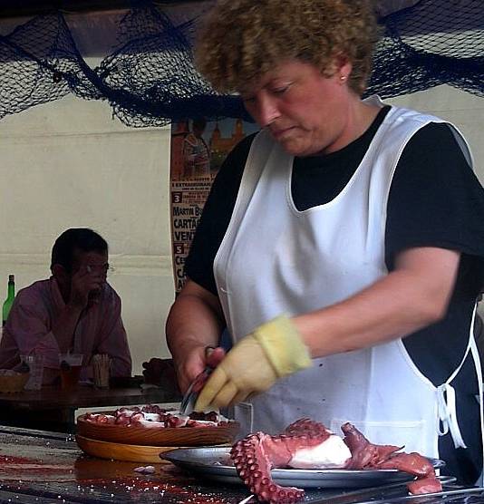 Polbeira, A Coruña, Galiza